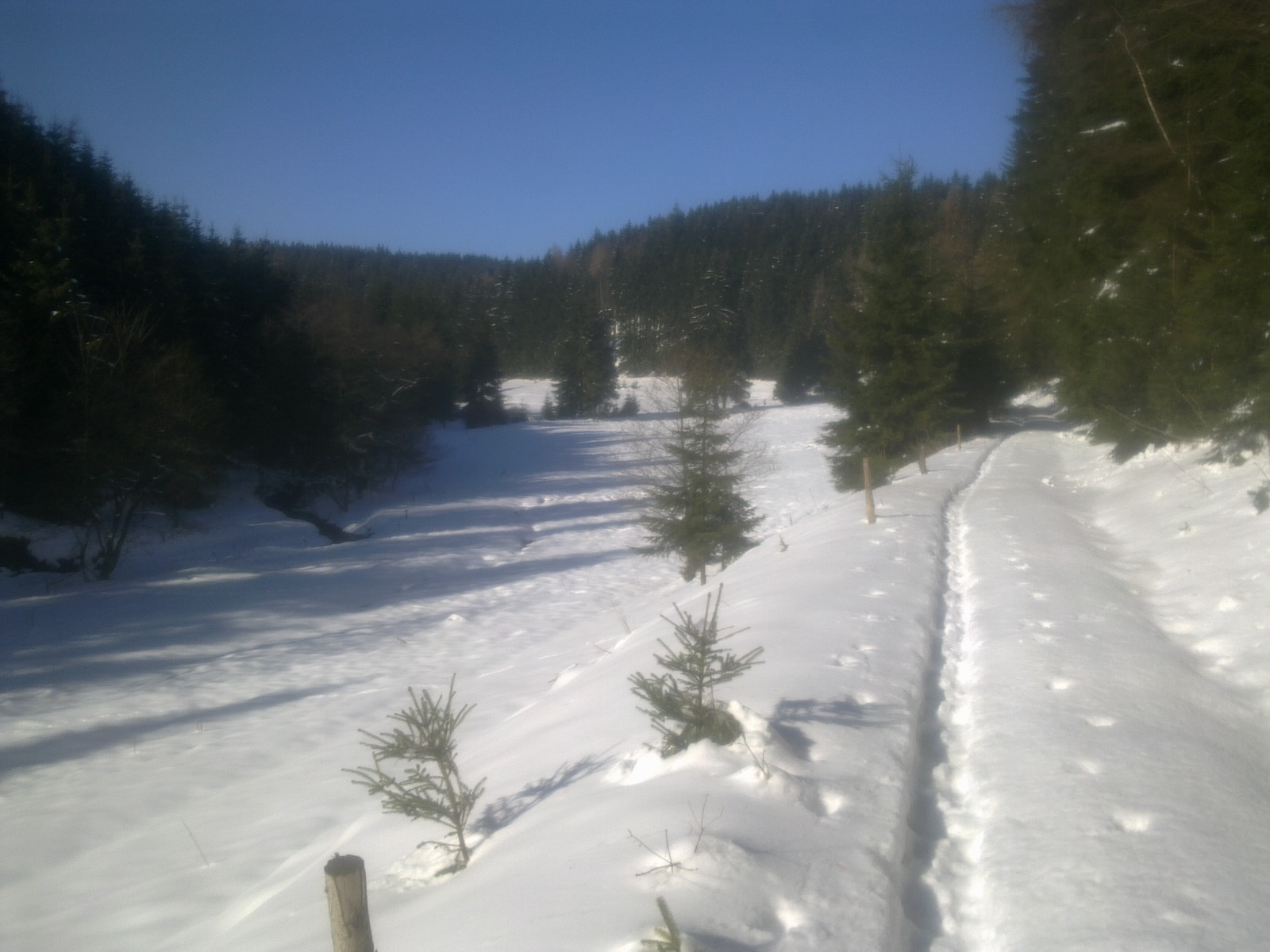 Das Reischeltal im Winter